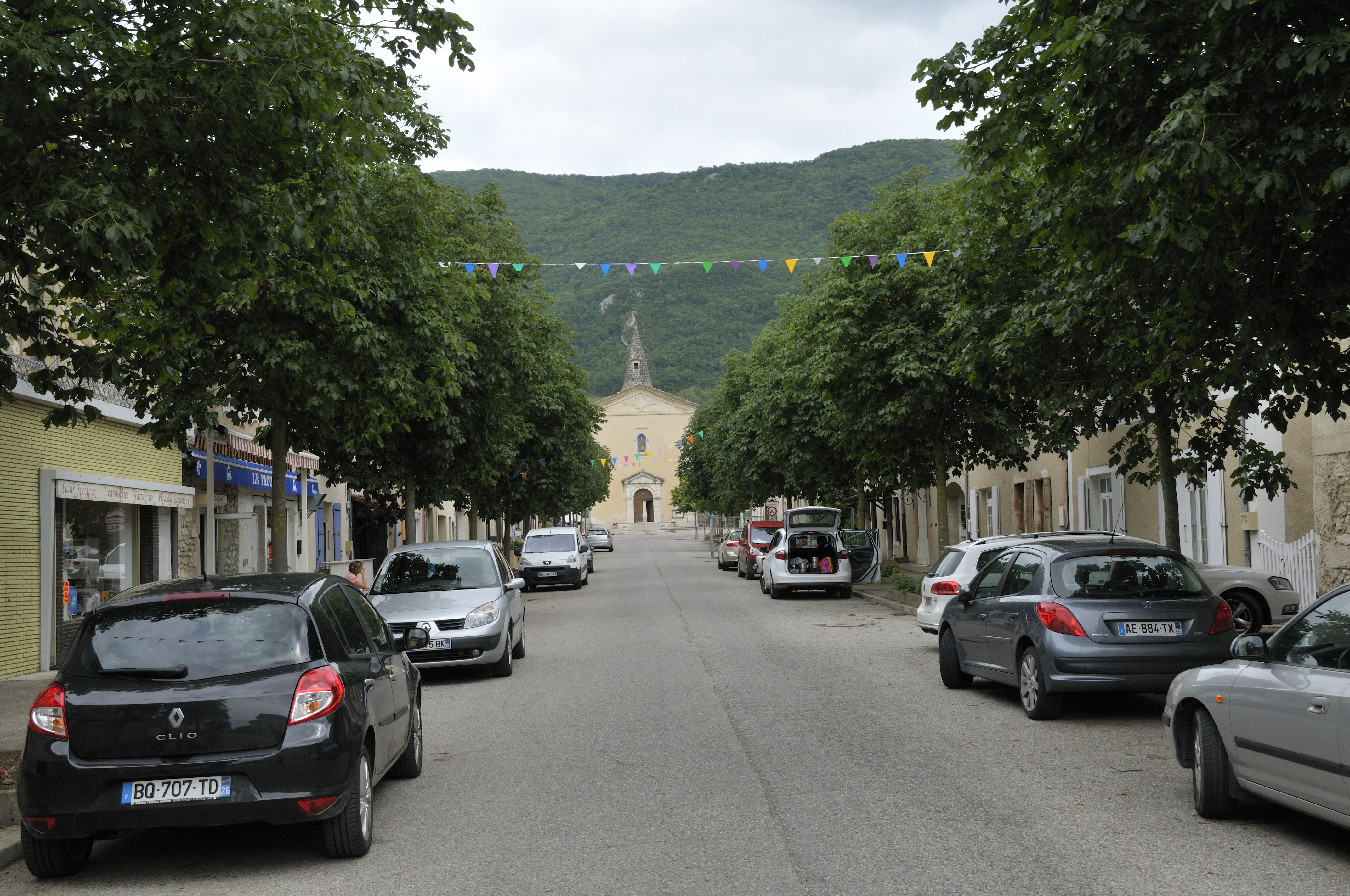 avenue des marronniers